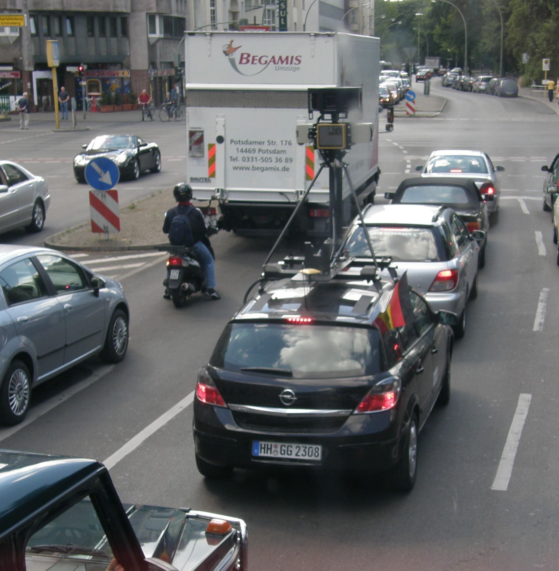 Pkw mit 360°-Kamera zur Aufnahme von Straßenansichten für Google-Street-View in der Straße Alt-Moabit, Berlin-Moabit